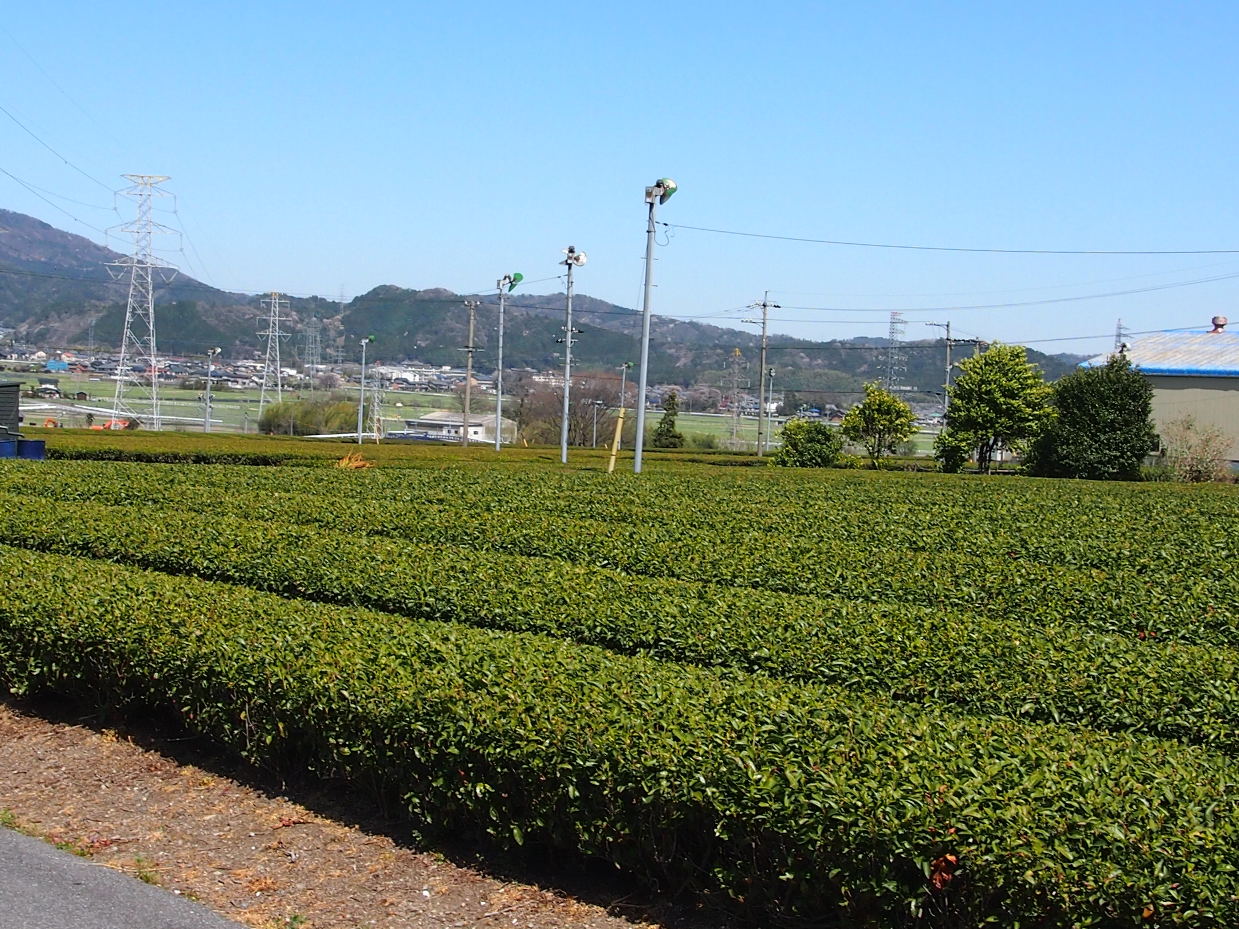 茶畑